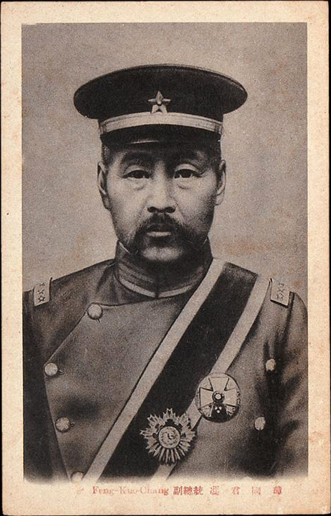 副總統馮國璋。民国名人明信片（一组十七件）之一。